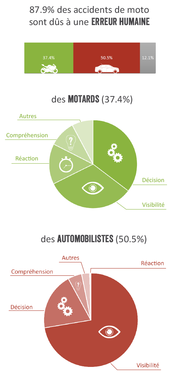 Graphiques représentant les sources d'accidents en deux roues motorisés. Source des données : Etude MAIDS. Crédit francecasse.fr